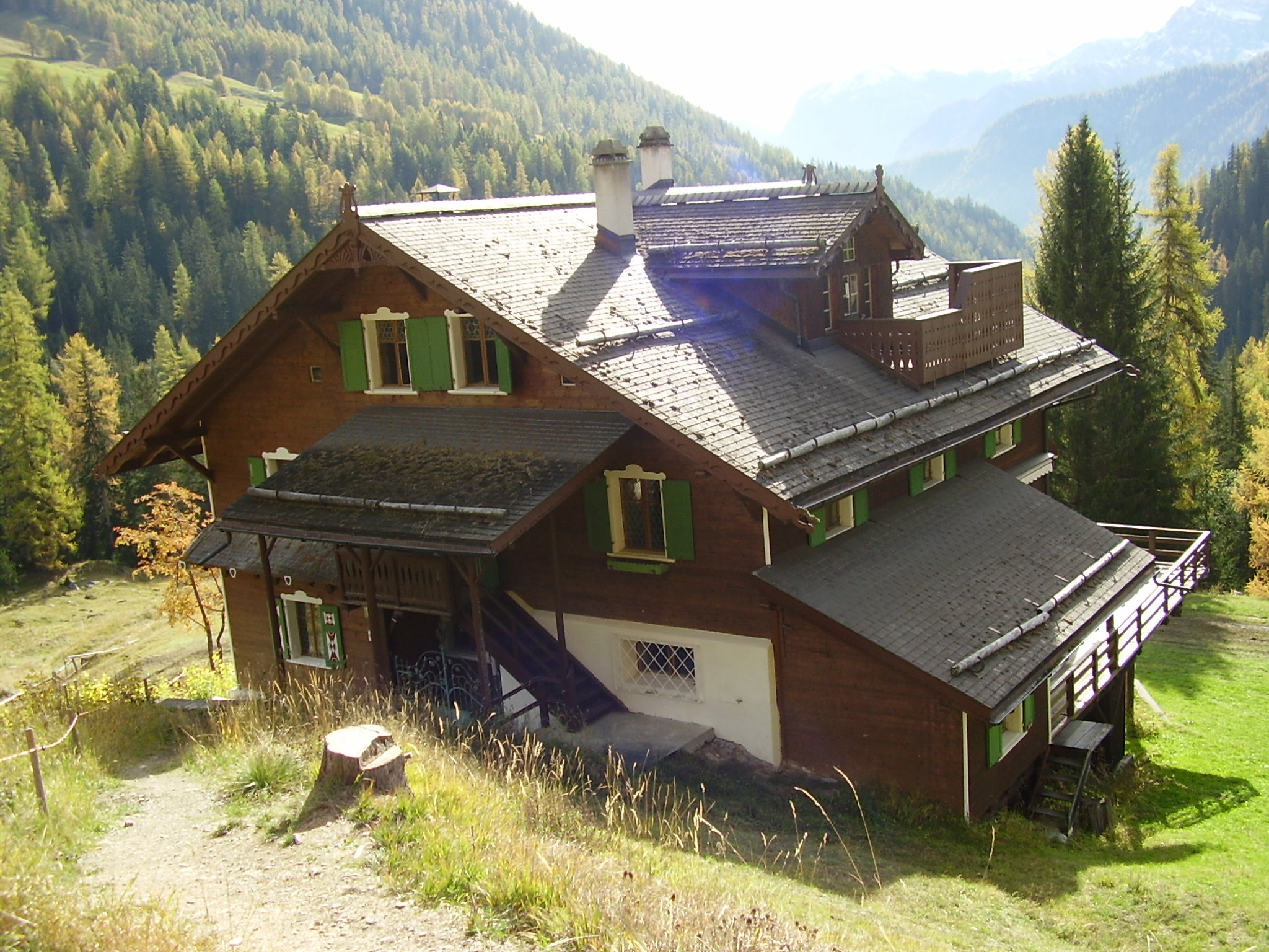 Chasa Mengelberg; die Villa, die Willem Mengelberg im frühen 20. Jahrhundert im Val Sinestra (bei Sent, Schweiz) erbauen liess. Heute dient die Villa als Unterkunft für junge Musiker.